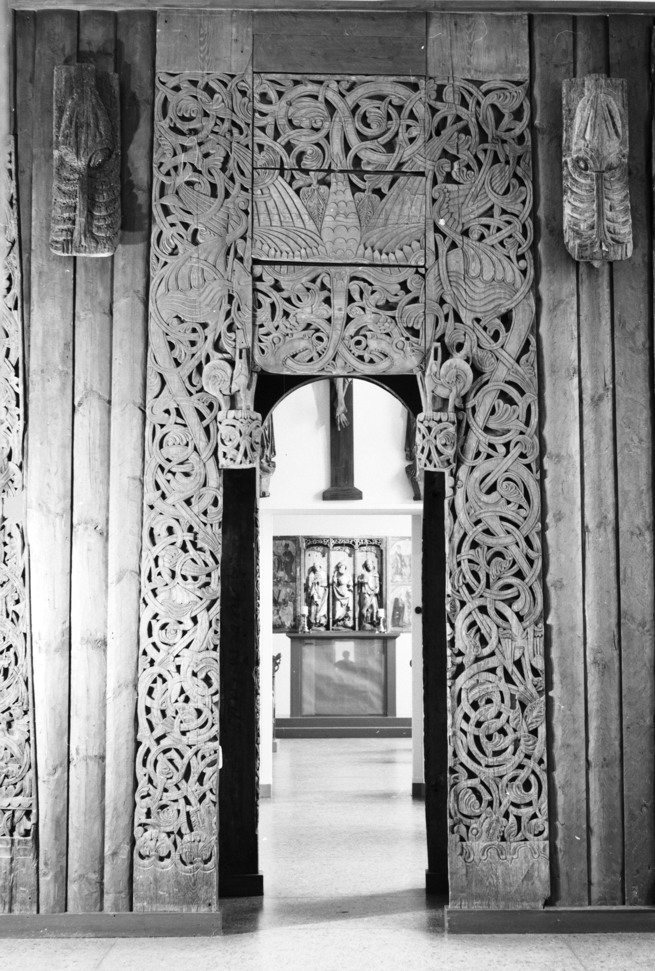 Portal fra Tuft stavkirke. Foto: J. Rácz, fra Unimus.